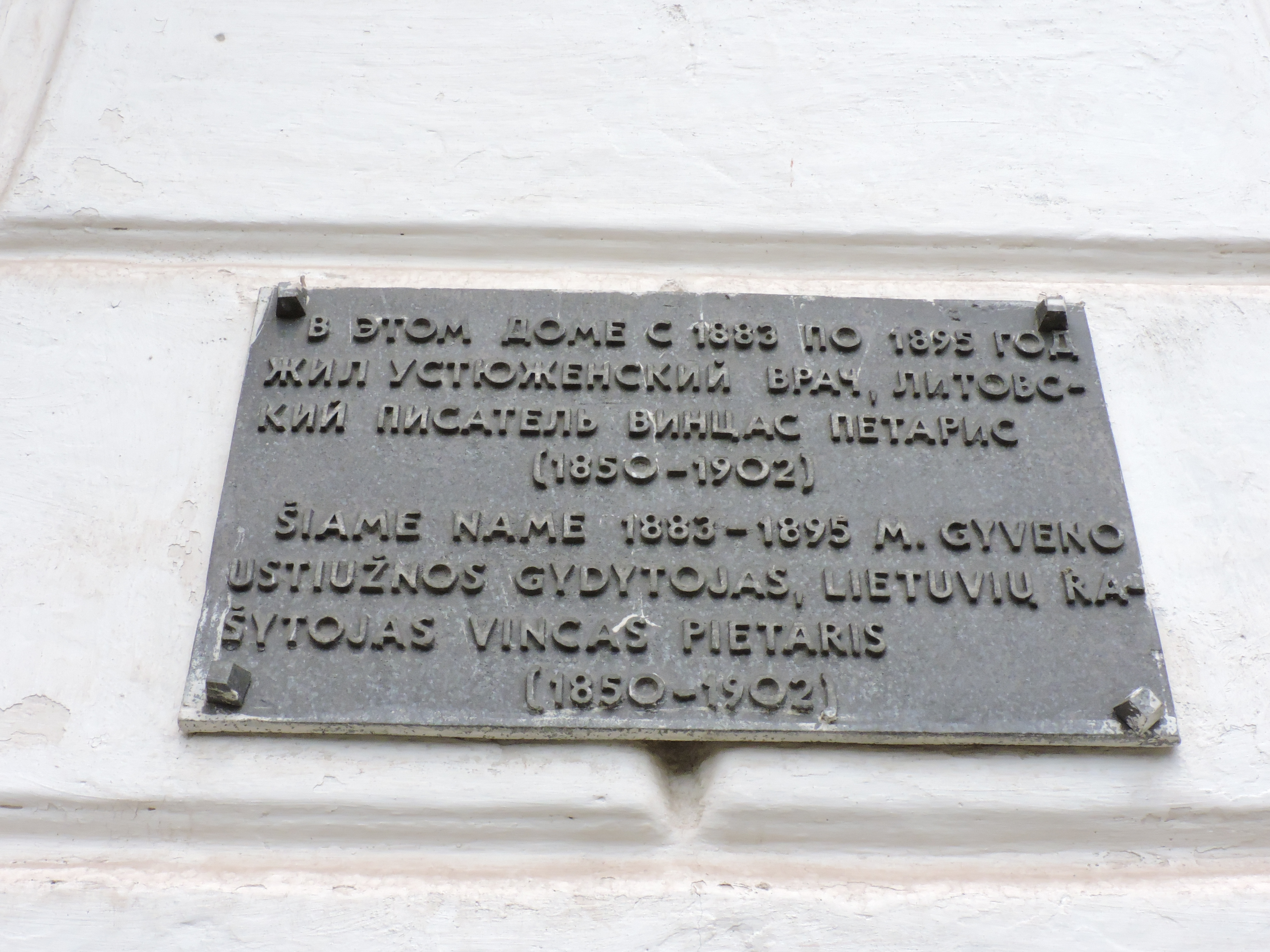 Мемориальная доска Винцасу Петарису